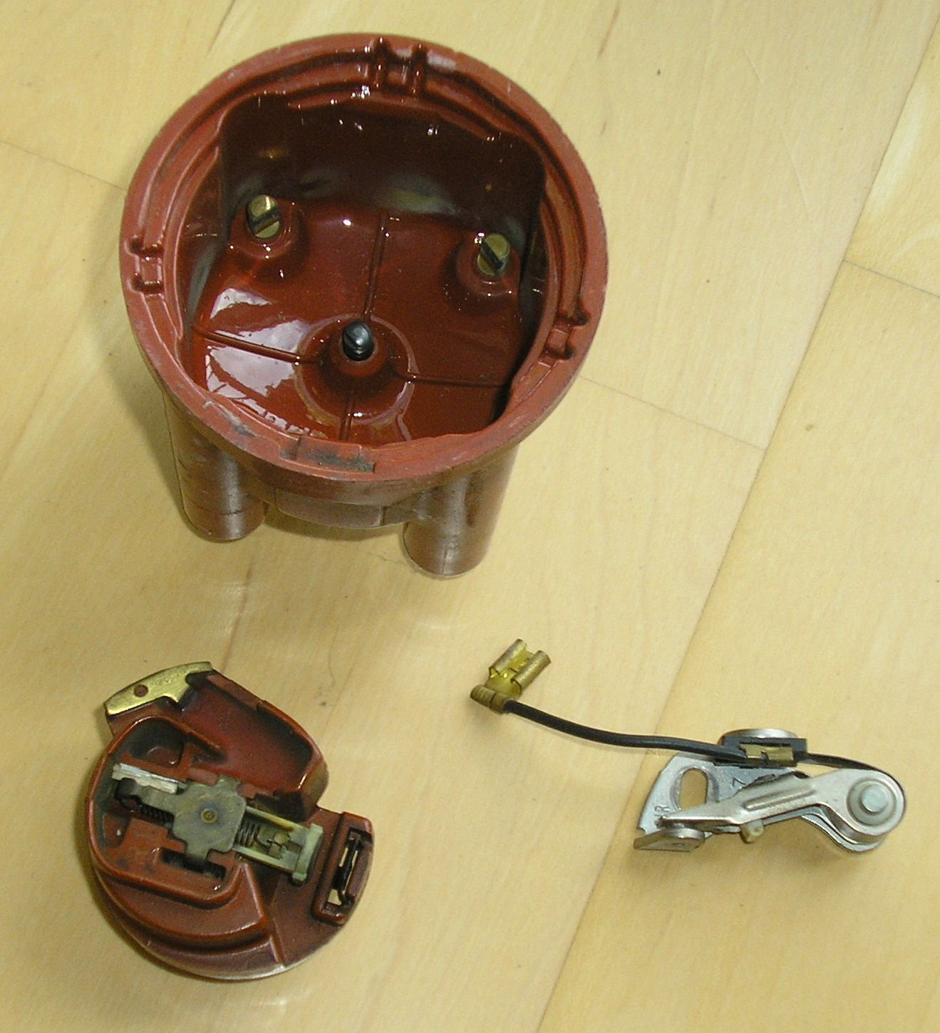 einige Bestandteile des Zündverteilers an einem Vierzylindermotor: Oben die Verteilerkappe, links unten der Verteilerläufer (Rotor mit Fliehkraft-Drehzahlbegrenzer), rechts unten der Unterbrecherkontakt